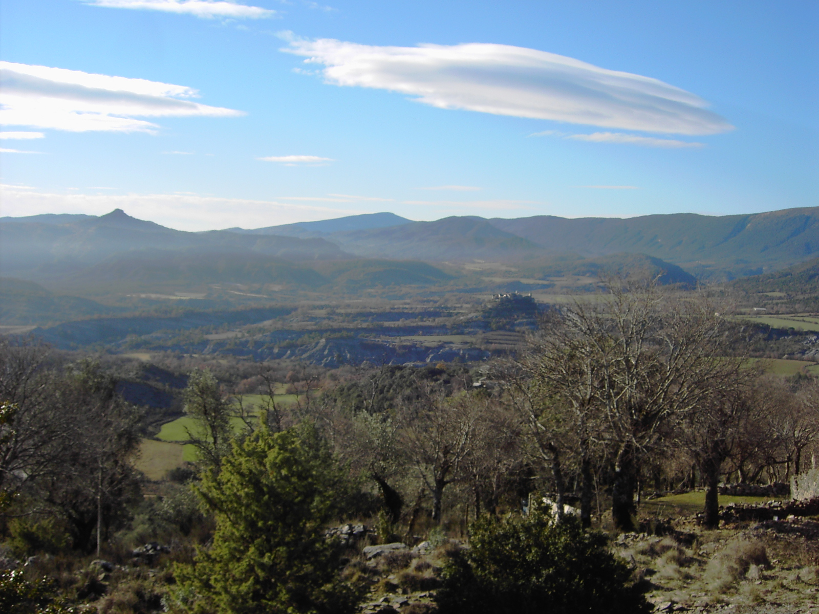 El río Ena en la depresión de l'Arcusa, formando el Biello Sobrarbe. De fondo, las sierras de Guara y sus estribaciones en Balcés y Sevil despuntando entre ellas el Tozal de l'Asba (1441m).